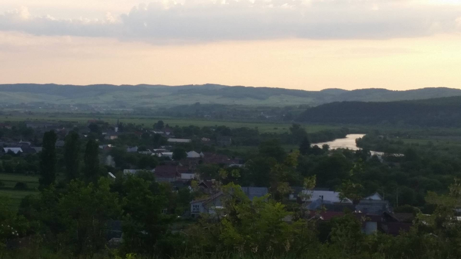 Vedere a partii estice a satului Nimigea de jos.